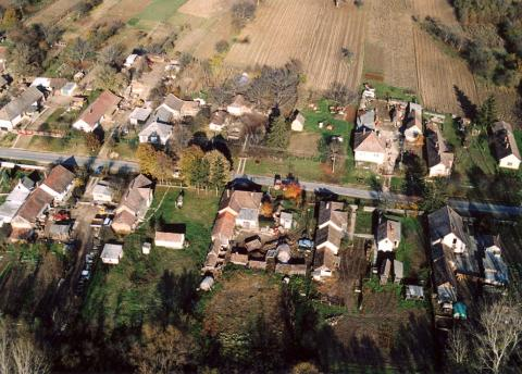 Bálványos.